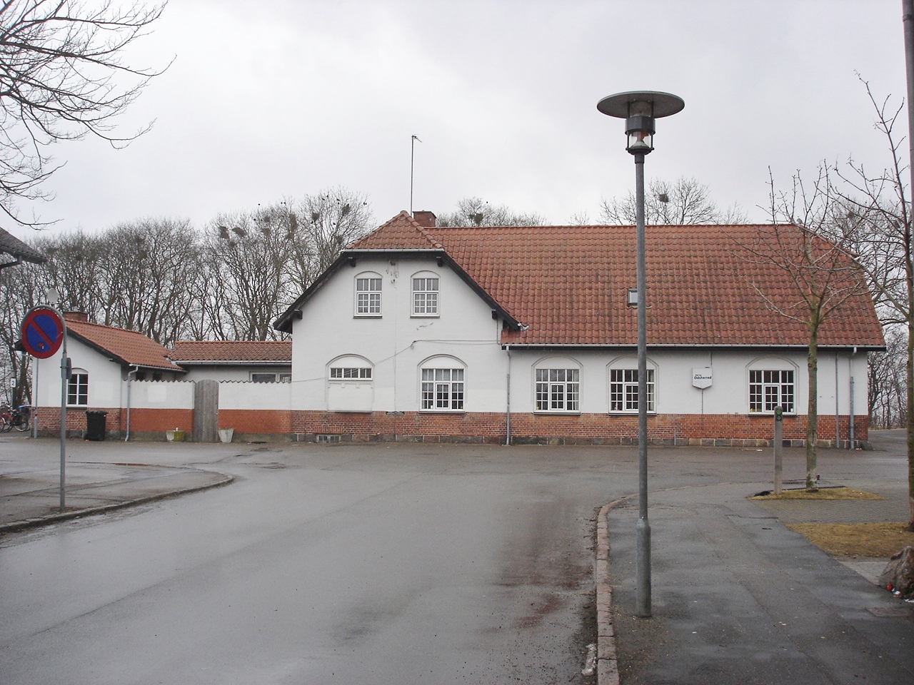 Hørve Station fra vejsiden